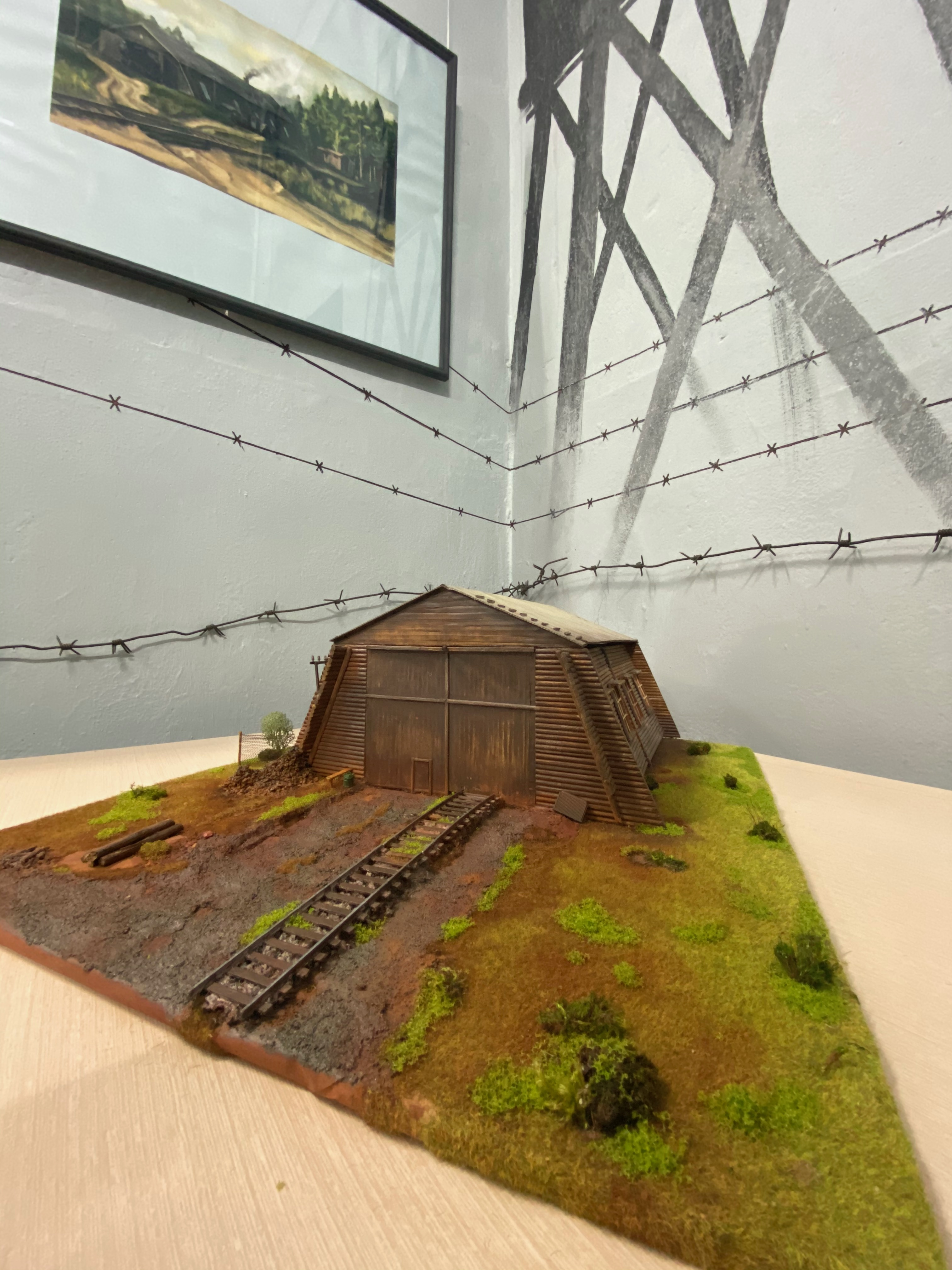 макет депо лагеря Унжлаг